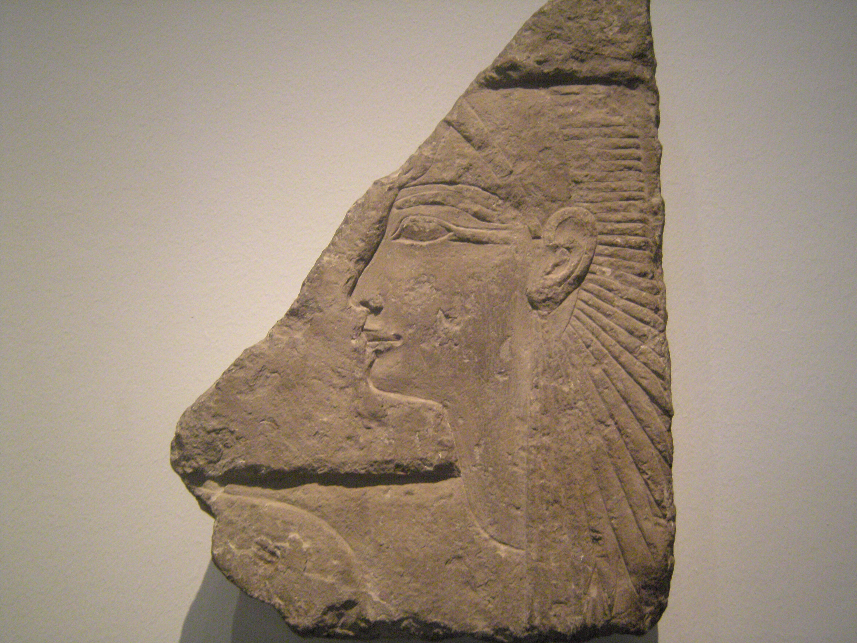 Bruchstück eines Kalksteinreliefs mit einer Geiergöttin